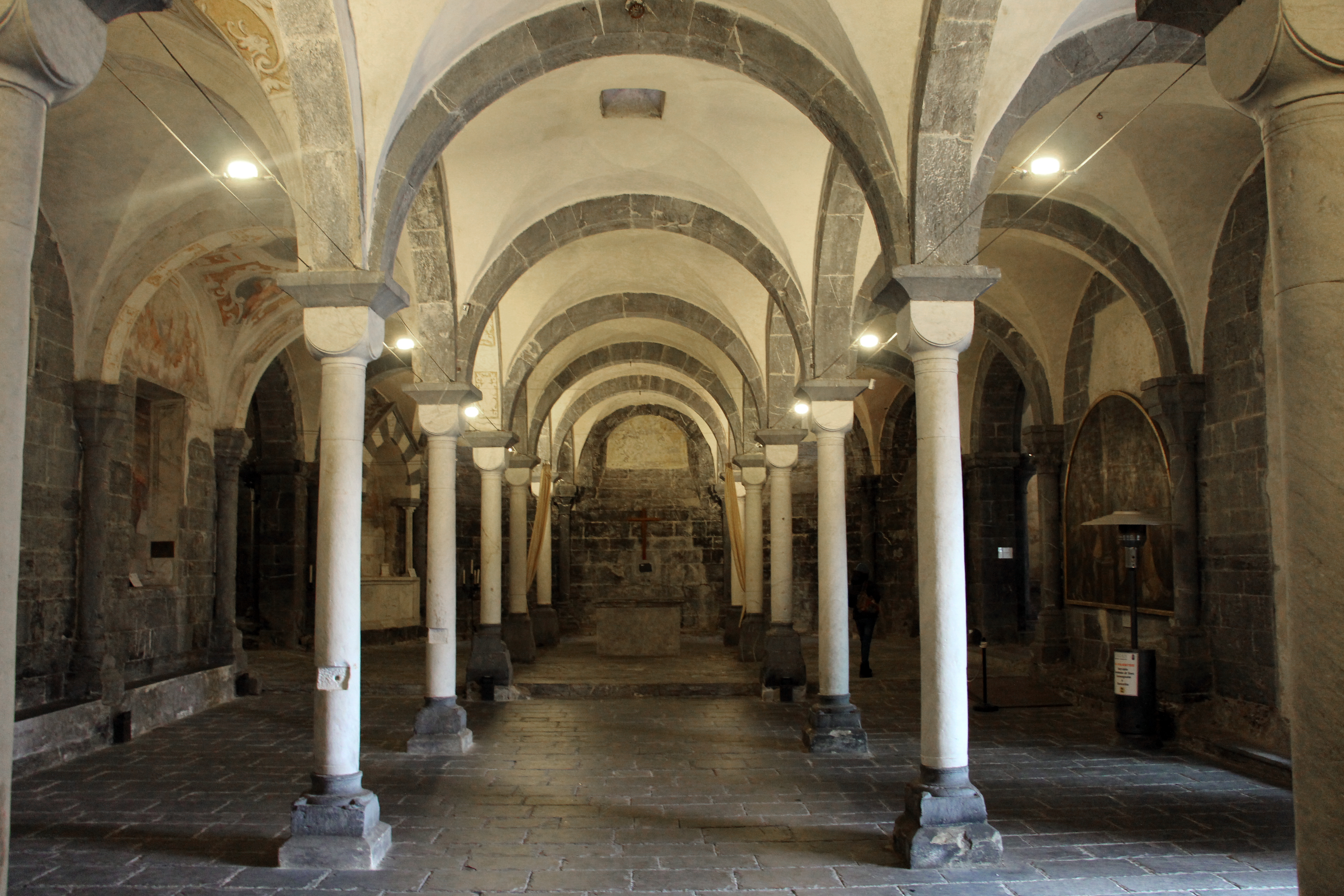 Commenda di San Giovanni di Pré